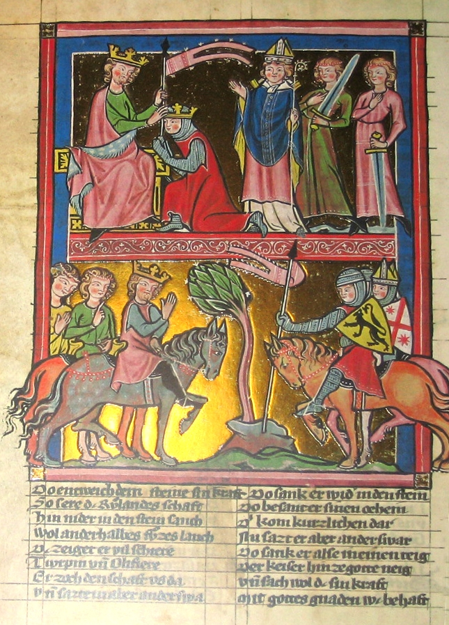 E Facsimile vun enger Säit aus dem Stricker sengem Karl der Grosse